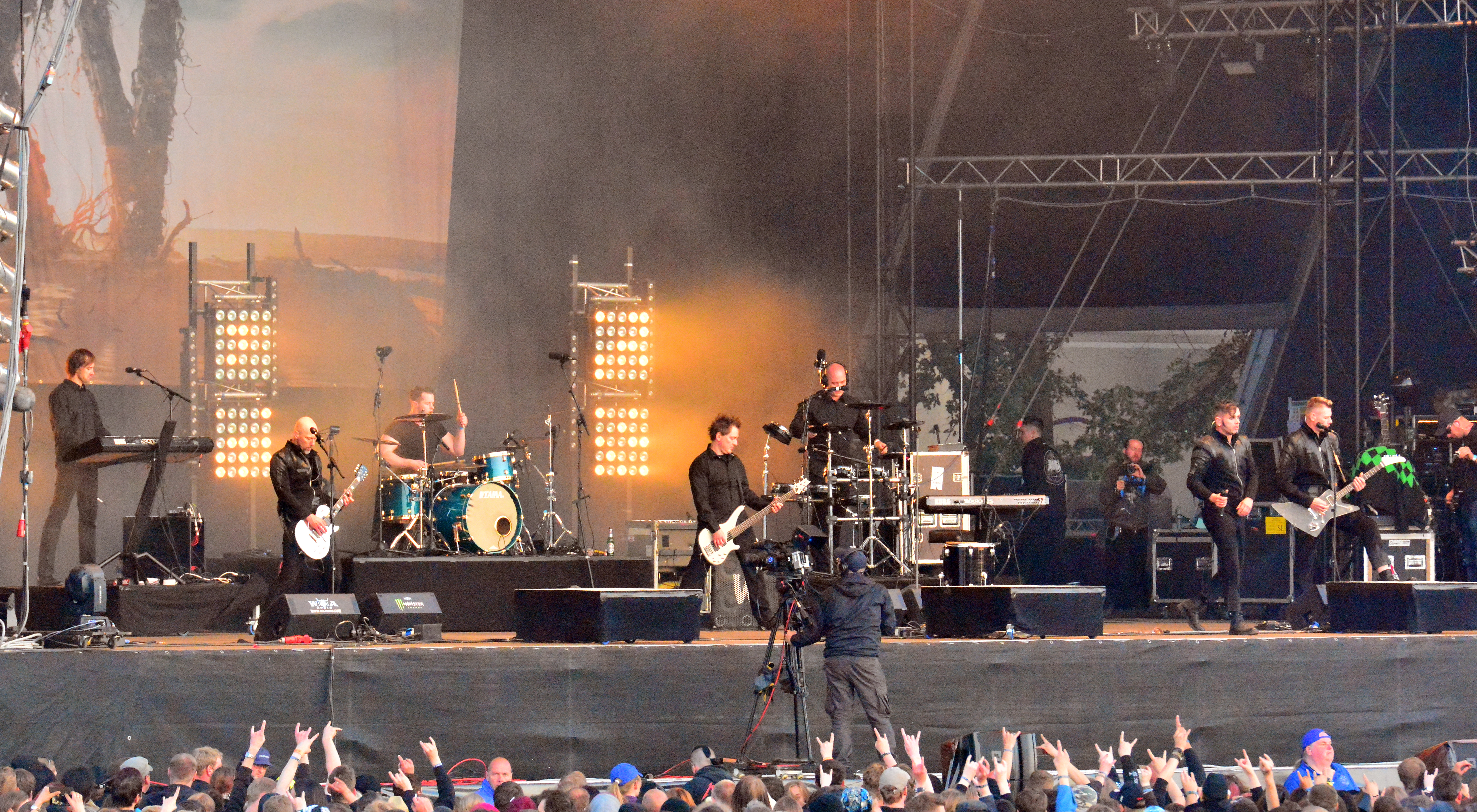 Oomph! beim Wacken Open Air 2015